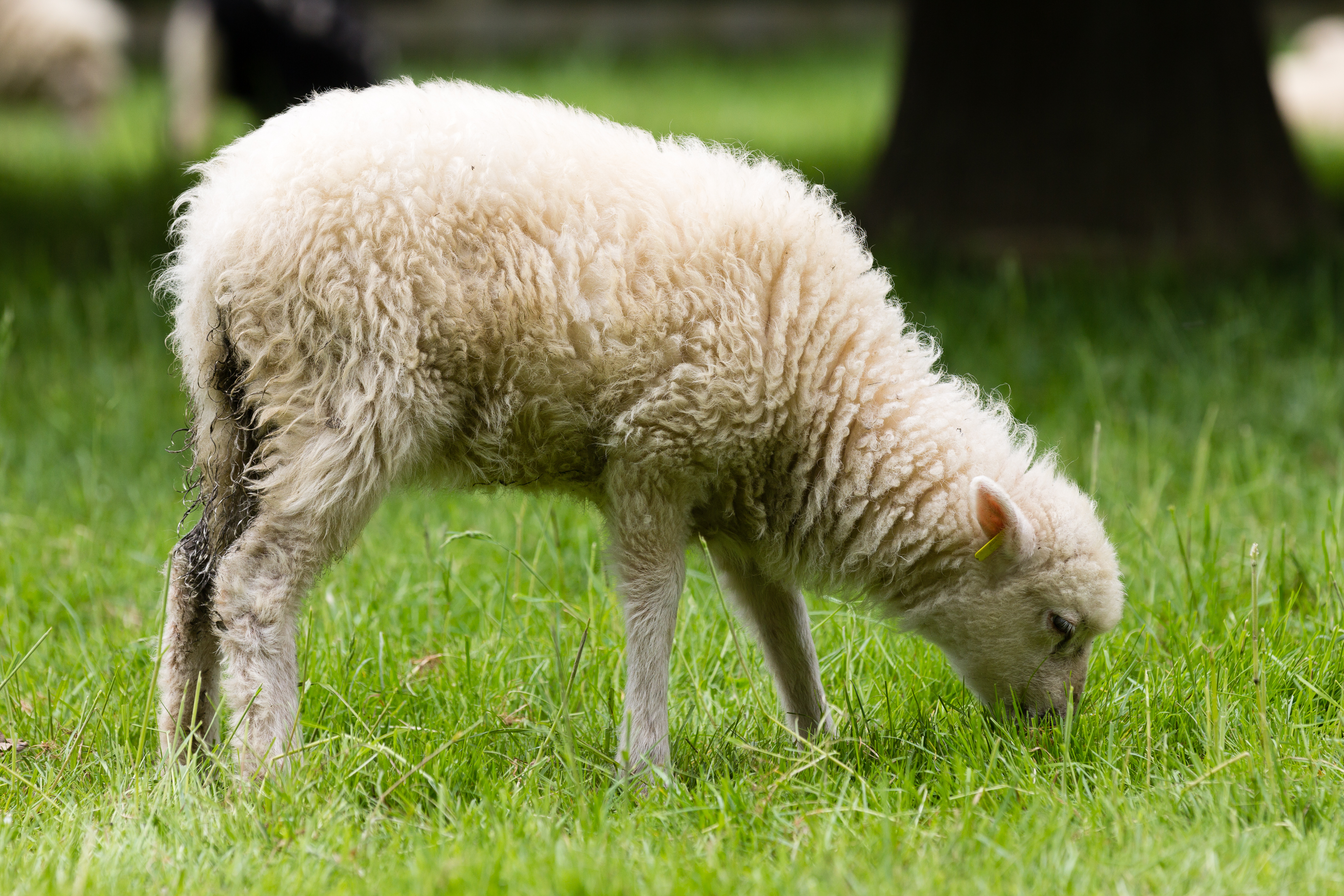 Mouton des landes de Bretagne à l'Écomusée du pays de Rennes.